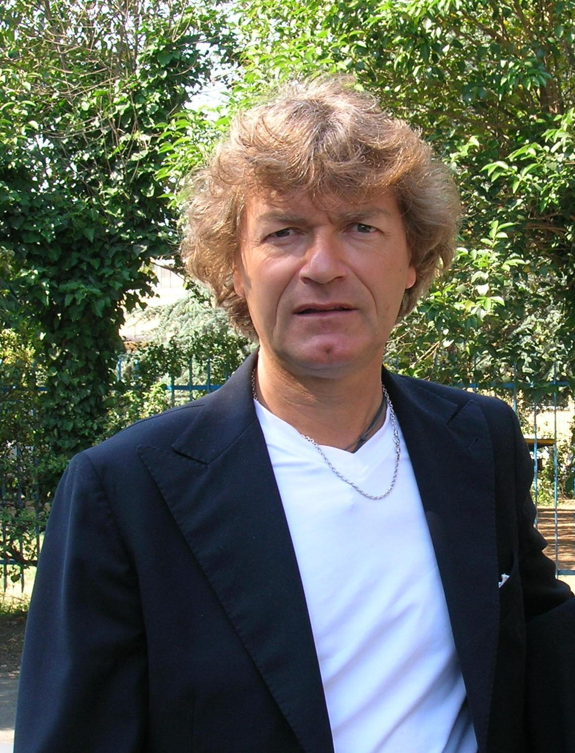 Giancarlo Antognoni in visita ad una scuola elementare fiorentina.